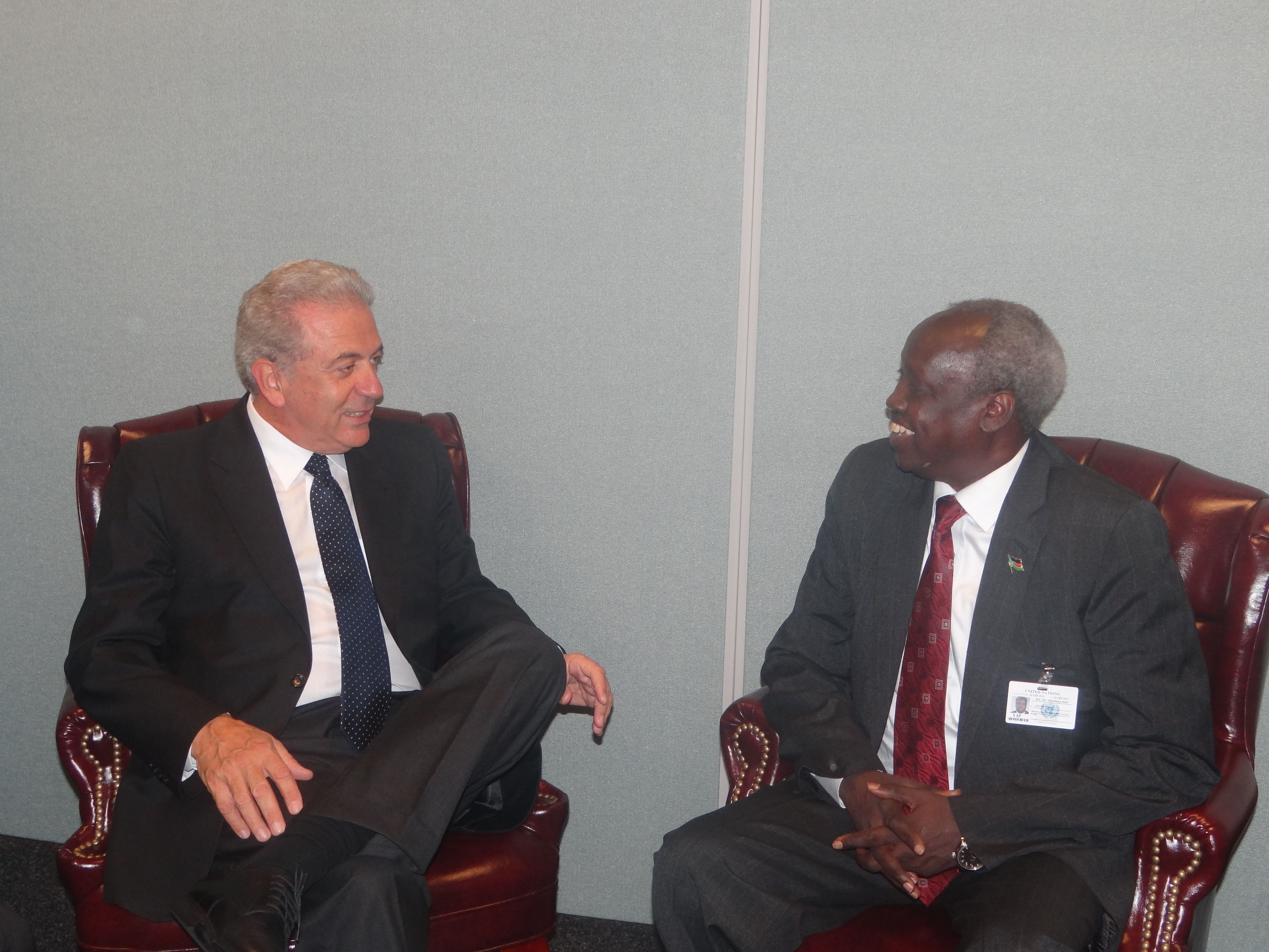 Συνάντηση ΥΠΕΞ Δ. Αβραμόπουλου με ΥΠΕΞ Νοτίου Σουδάν Nhial Deng Nhial